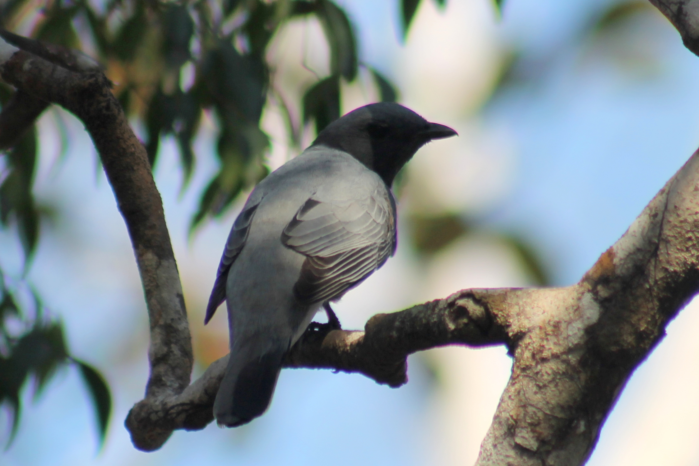 Madagaskarrupsvogel